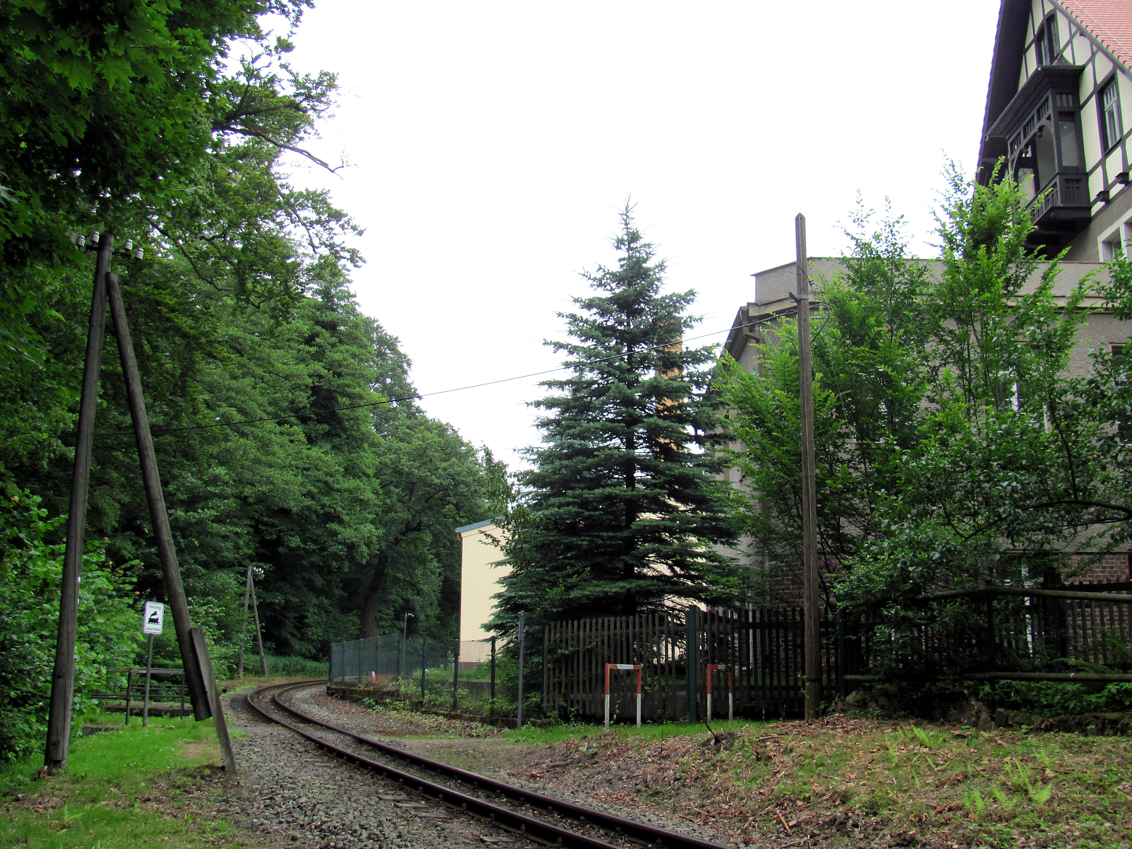 Radebeul, Haus A des Elektrizitätswerks Niederlößnitz an den Gleisen des Lößnitzdackels